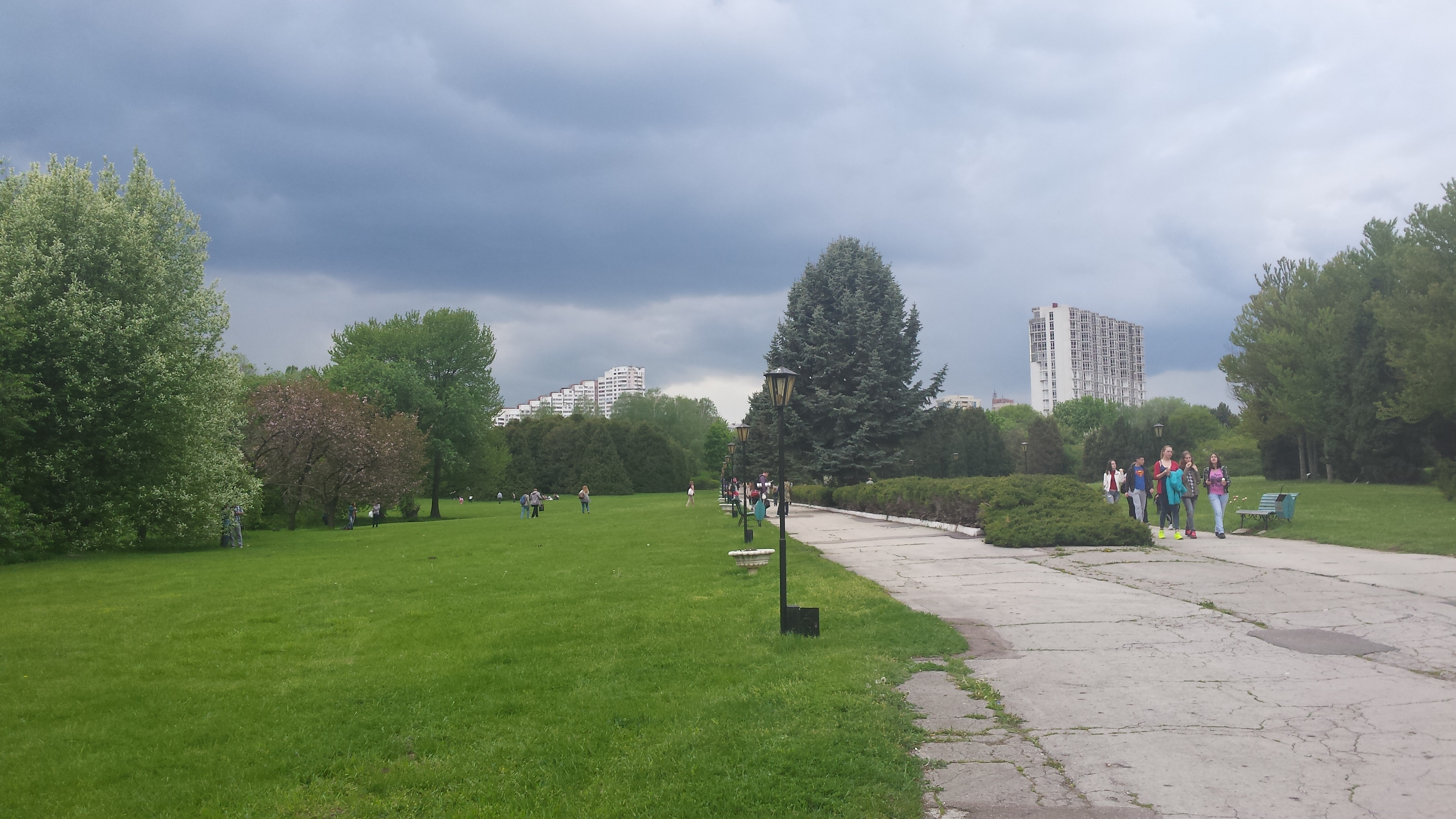 Grădina Botanică din Chișinău